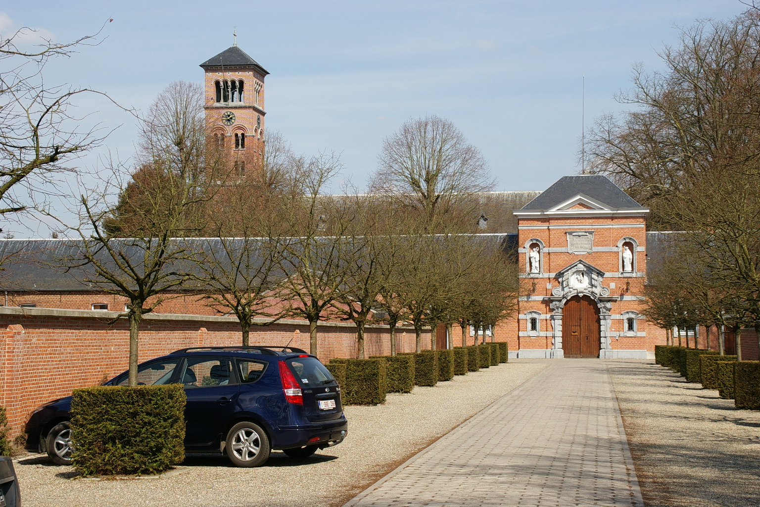 Westmalle Abbey entrance, with campanile in the background